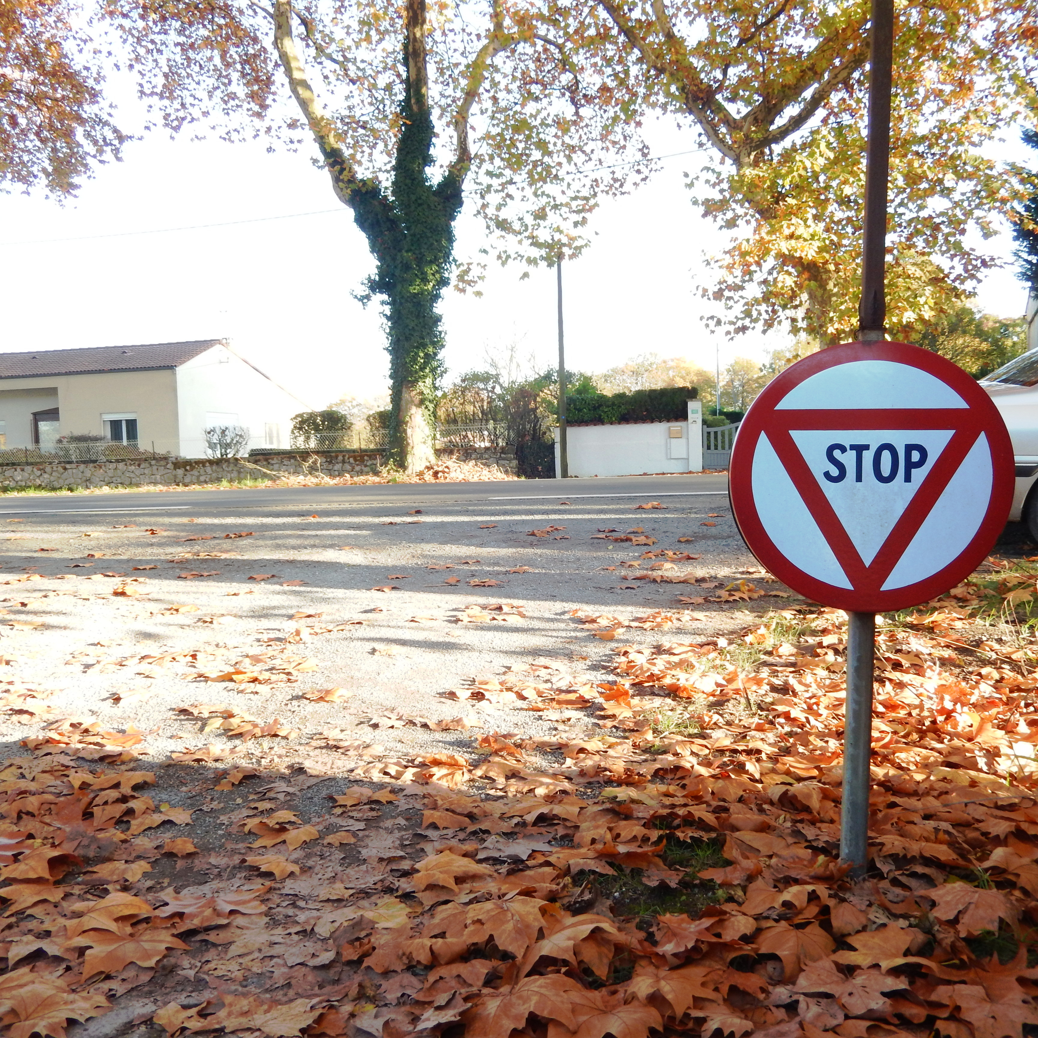 Un panneau Stop, de type B10, fabriqué en 1971, et encore en place quelque part dans la commune de Fontcouverte, en Charente-Maritime. Le panneau B10 est l'ancêtre du panneau AB4 octogonal mis en place en France à partir du début de la décennie 1970.